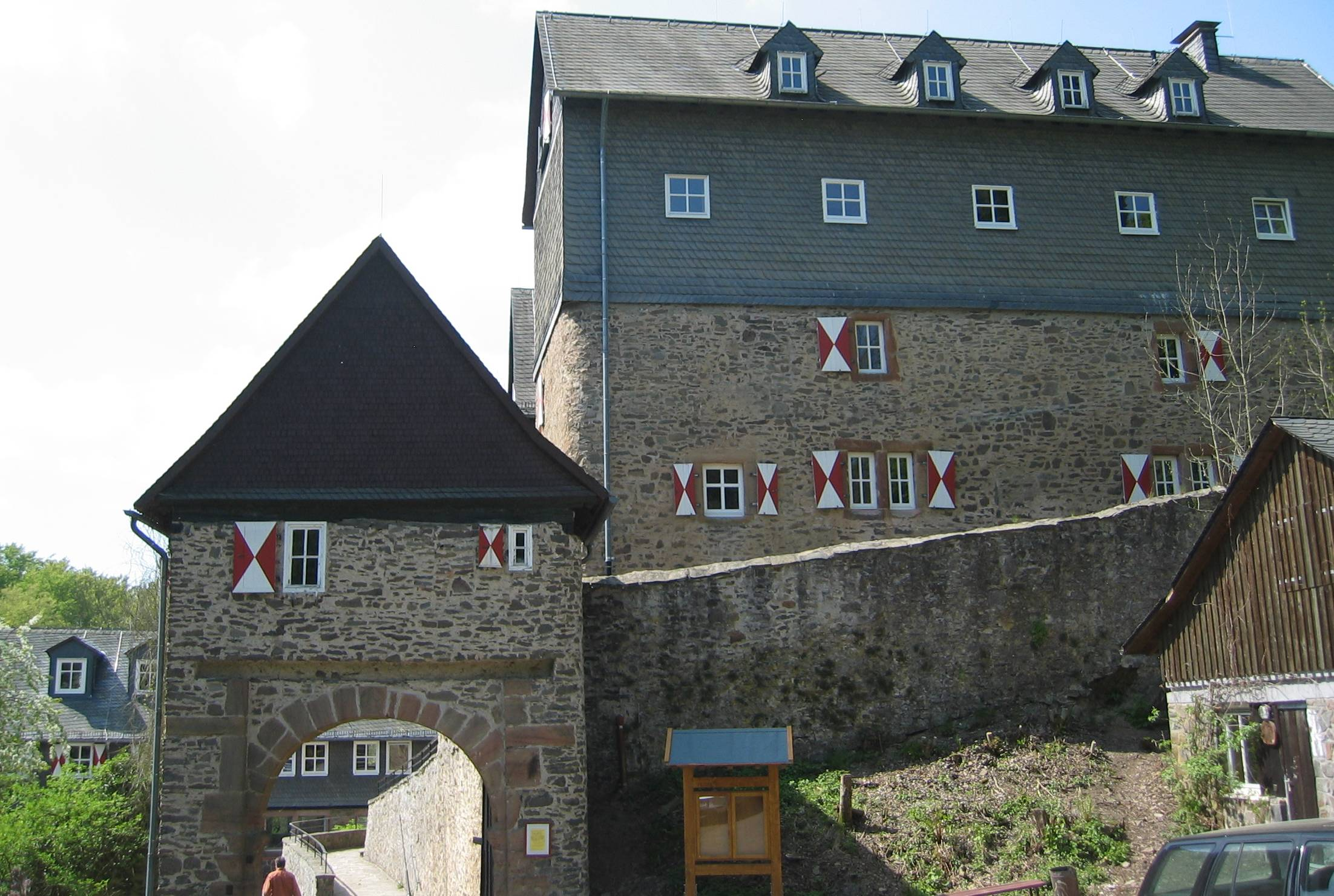 Burg Hessenstein